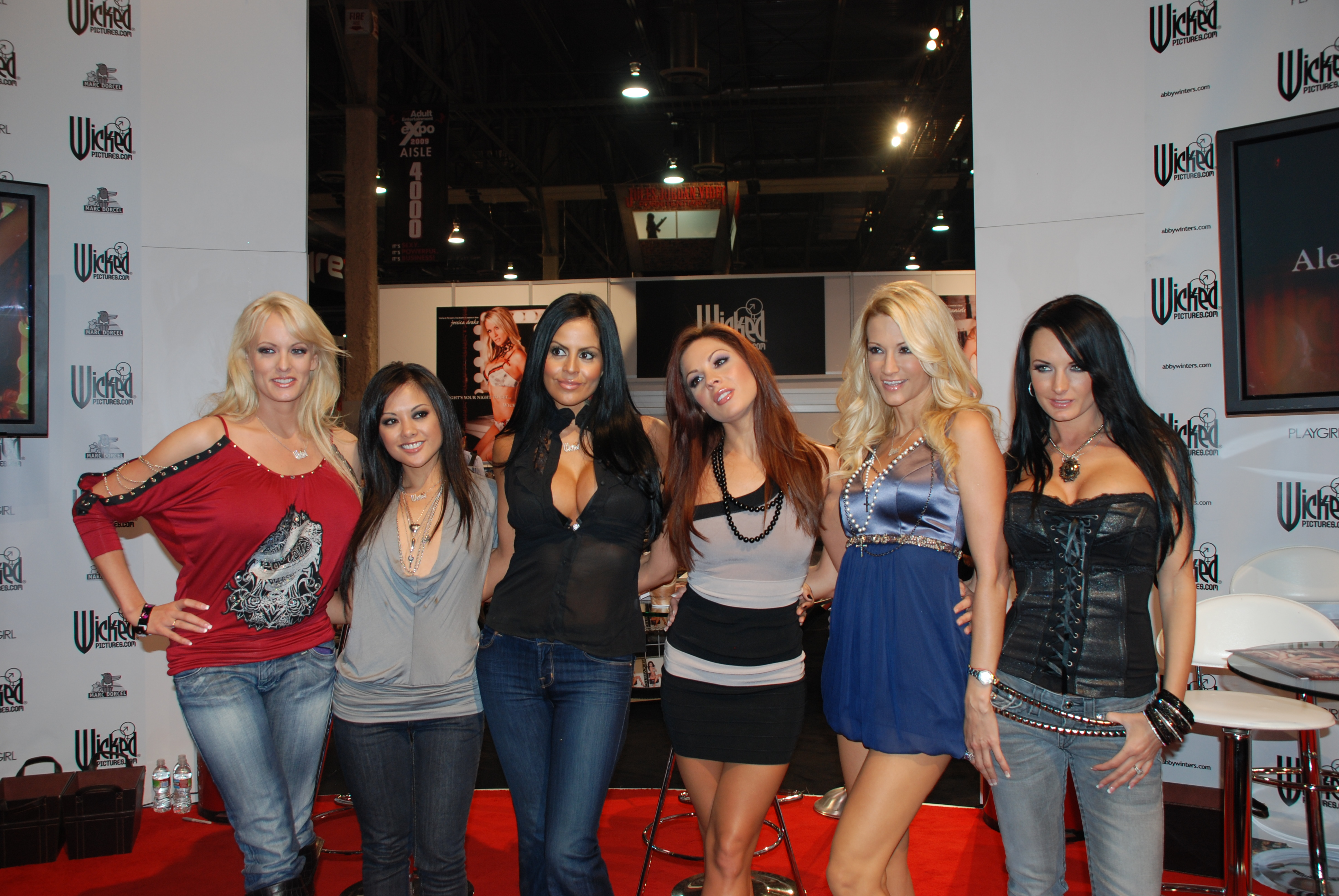 (L-R) Stormy Daniels, Kaylani Lei, Mikayla Mendez, Kirsten Price, Jessica Drake and Alektra Blue